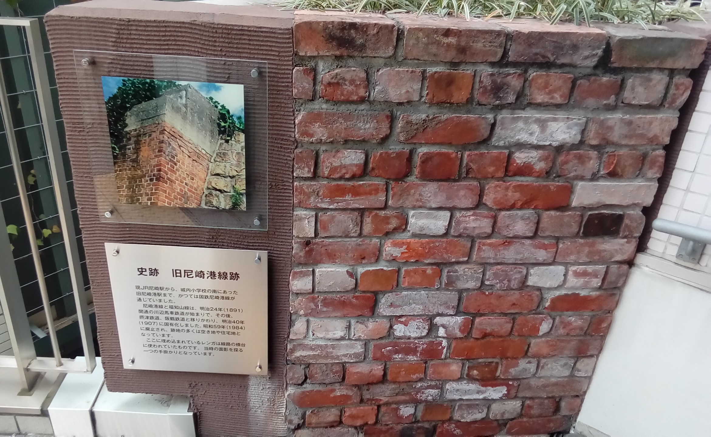 尼崎港線のモニュメント（兵庫県尼崎市）